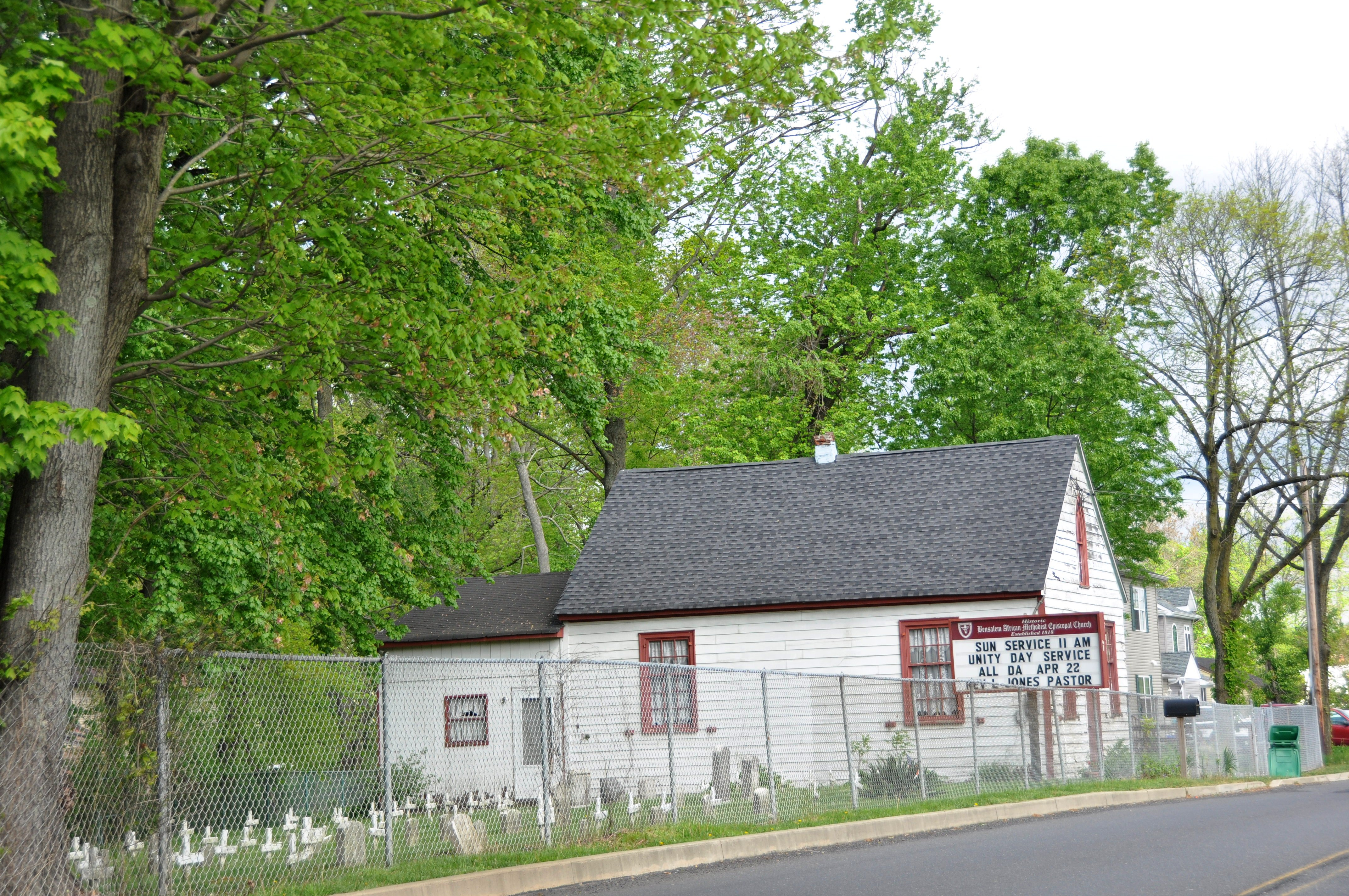 The Little Jerusalem AME Church in Bensalem, Pennsylvania.